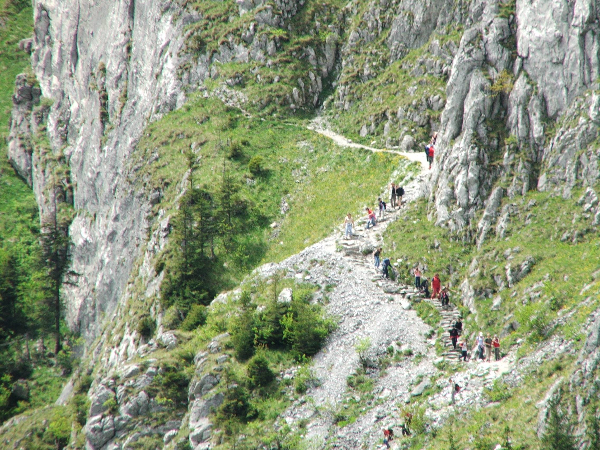 Raptawicka Turnia, ścieżka do Jaskini Raptawickiej, (West Tatra Mountains)